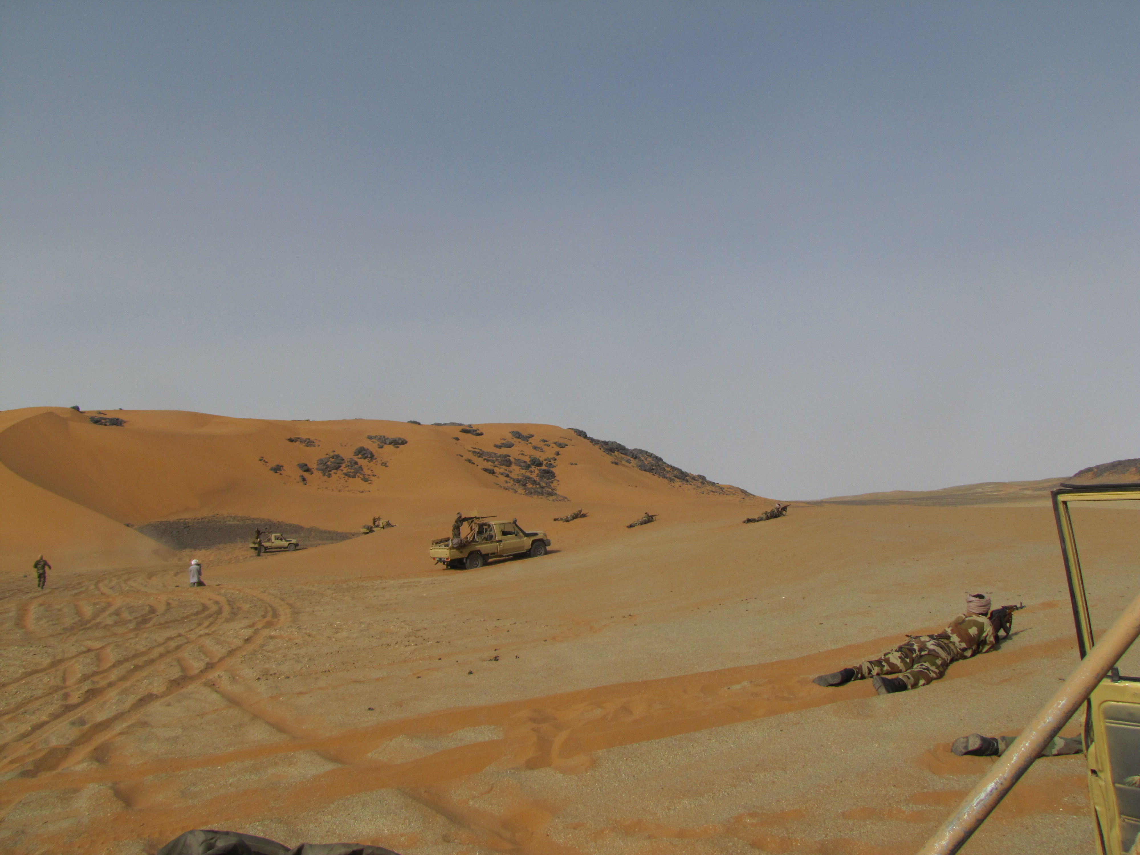 [Jemal Oumar] Mauritanian troops are on guard after accounts of al-Qaeda movement along the Mali-Mauritania border region. القوات الموريتانية على أهبة الاستعداد بعد تقارير عن تحرك القاعدة على طول منطقة الحدود المالية الموريتانية L'armée mauritanienne est en état d'alerte après des rapports concernant les mouvements d'al-Qaida dans la région frontalière mauritano-malienne.